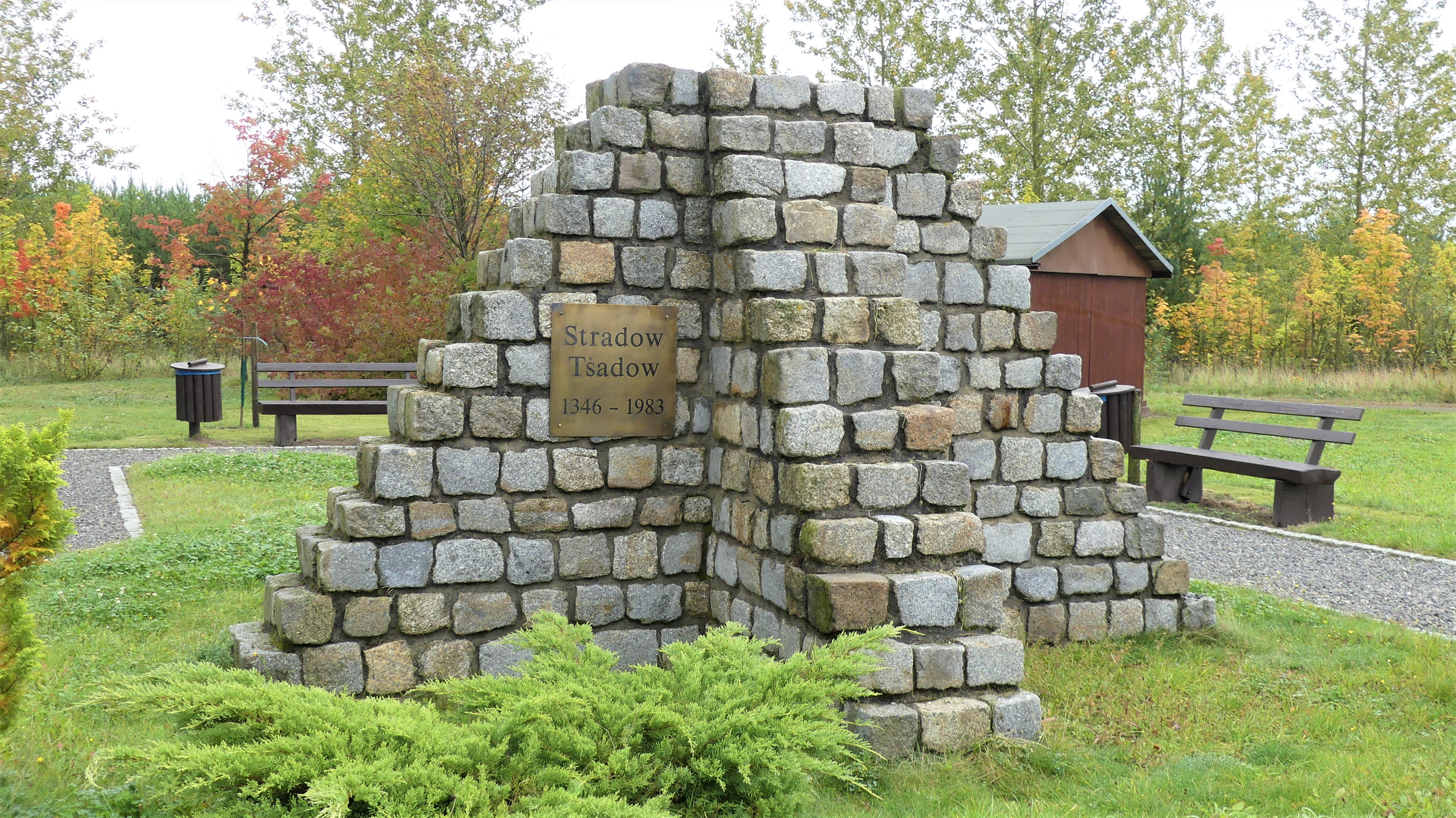 Gedenkstätte im Bereich der ehemaligen Ortslage Stradow. Die Gedenkstätte liegt im rekultivierten Bereich des Tagebaus Welzow-Süd.